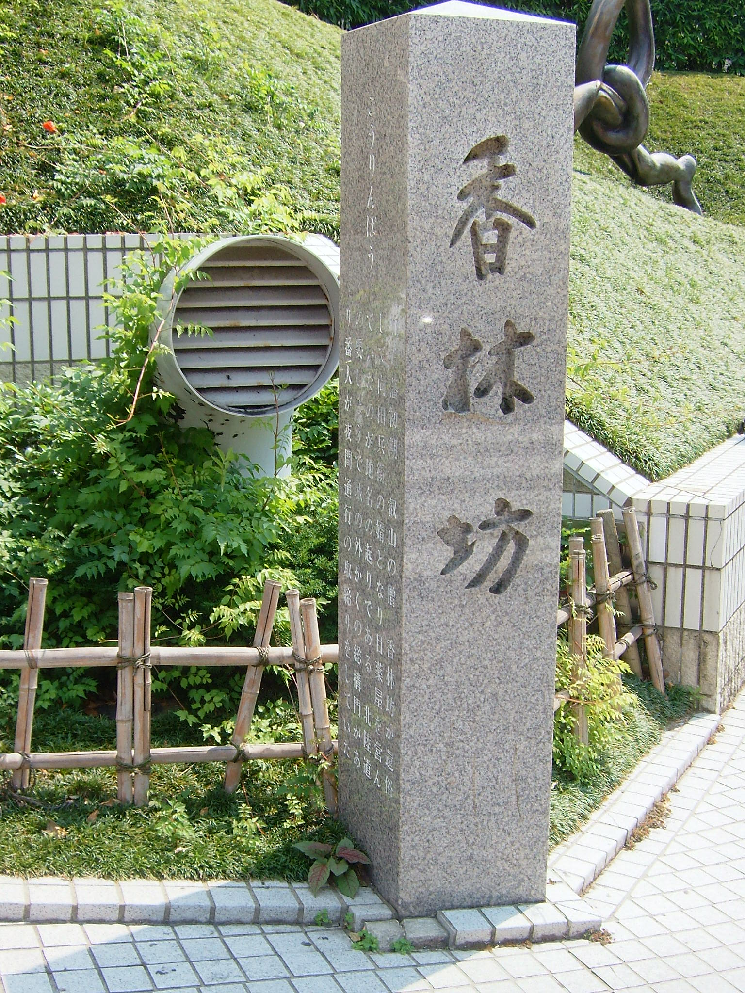 石川県金沢市香林坊交差点に立てられている石碑。香林坊の由来が記されている。